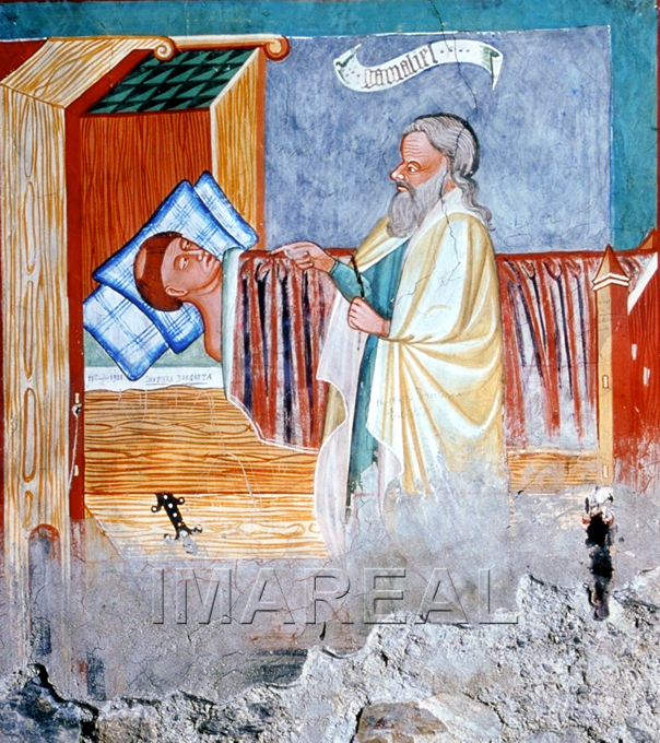 Gamaliel erscheint dem Lucianus im Traum Kunstwerk: Freskomalerei ; Wandmalerei sakral ; Zyklus ; Lombardei Dokumentation: 1400 ; 1410 ; Morter ; Italien ; Südtirol ; St. Stephan in Obermontani Anmerkungen: Morter ; Mittelschiff Handlung(en): schlafen, träumen, Ort(e): Innenraum, Person: Priester ; Mann ; schlafend , liegend Teil: Tonsur Kleidungsstück: nackt Person: Mann ; Zeigegestus Teil: Vollbart ; grau Attribute: Stab Kleidungsstück: Rock ; grün Kleidungsstück: Heuke ; gelb Teil: Innenfutter Objekt: Bett ; Holz Bezugsobjekt: Polster ; blau , weiß Teil: Stoffmuster ; kariert Bezugsobjekt: Leintuch ; grün Bezugsobjekt: Bettdecke ; rot Teil: Innenfutter ; grün Teil: Baldachin Teil des obigen: Kassettendecke Teil: Fürbank , Bettbank ; beschlagen Teil des obigen: Beschlag ; Eisen